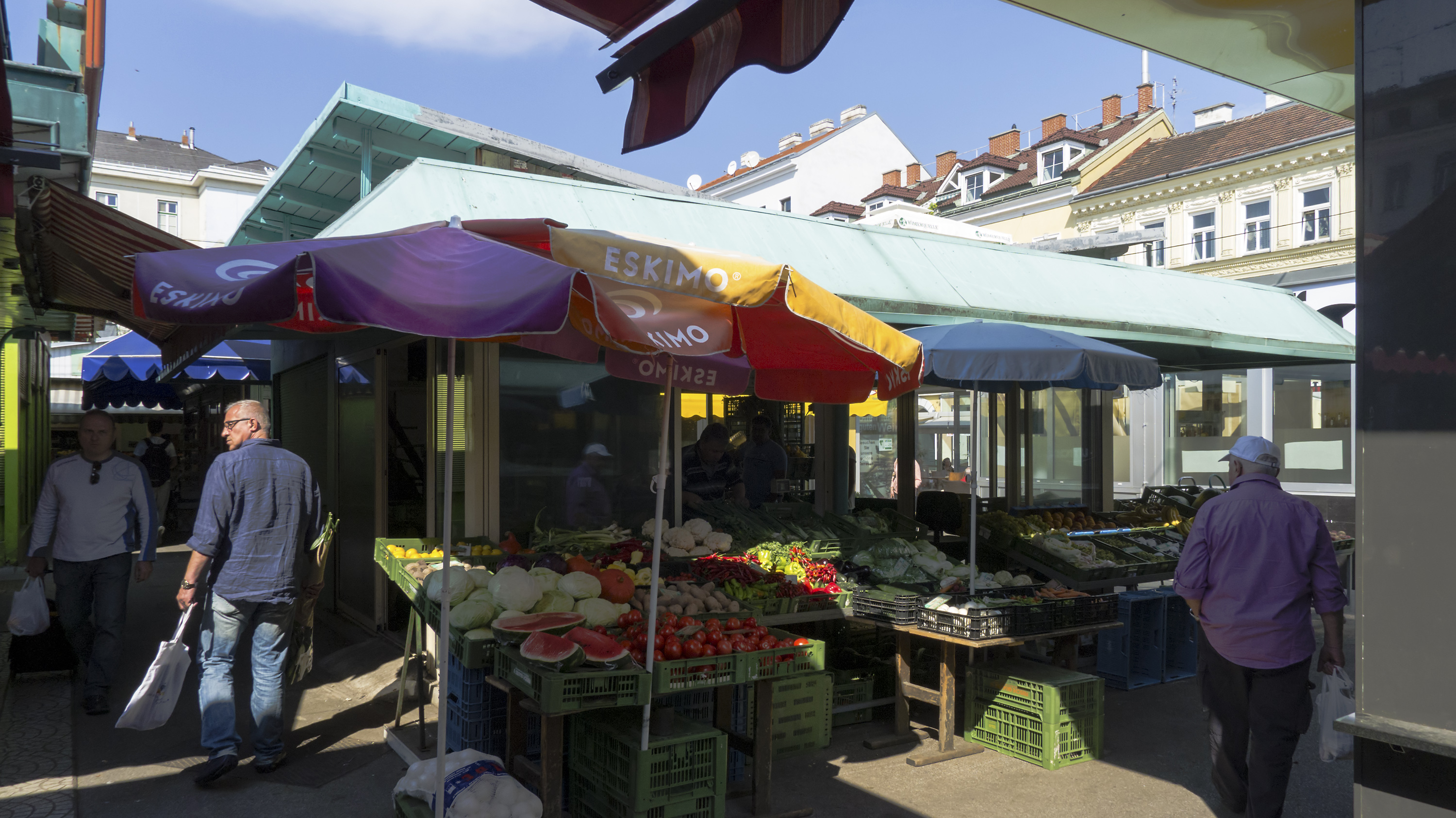 Viktor-Adler-Platz bzw. Viktor-Adler-Markt in Wien 10